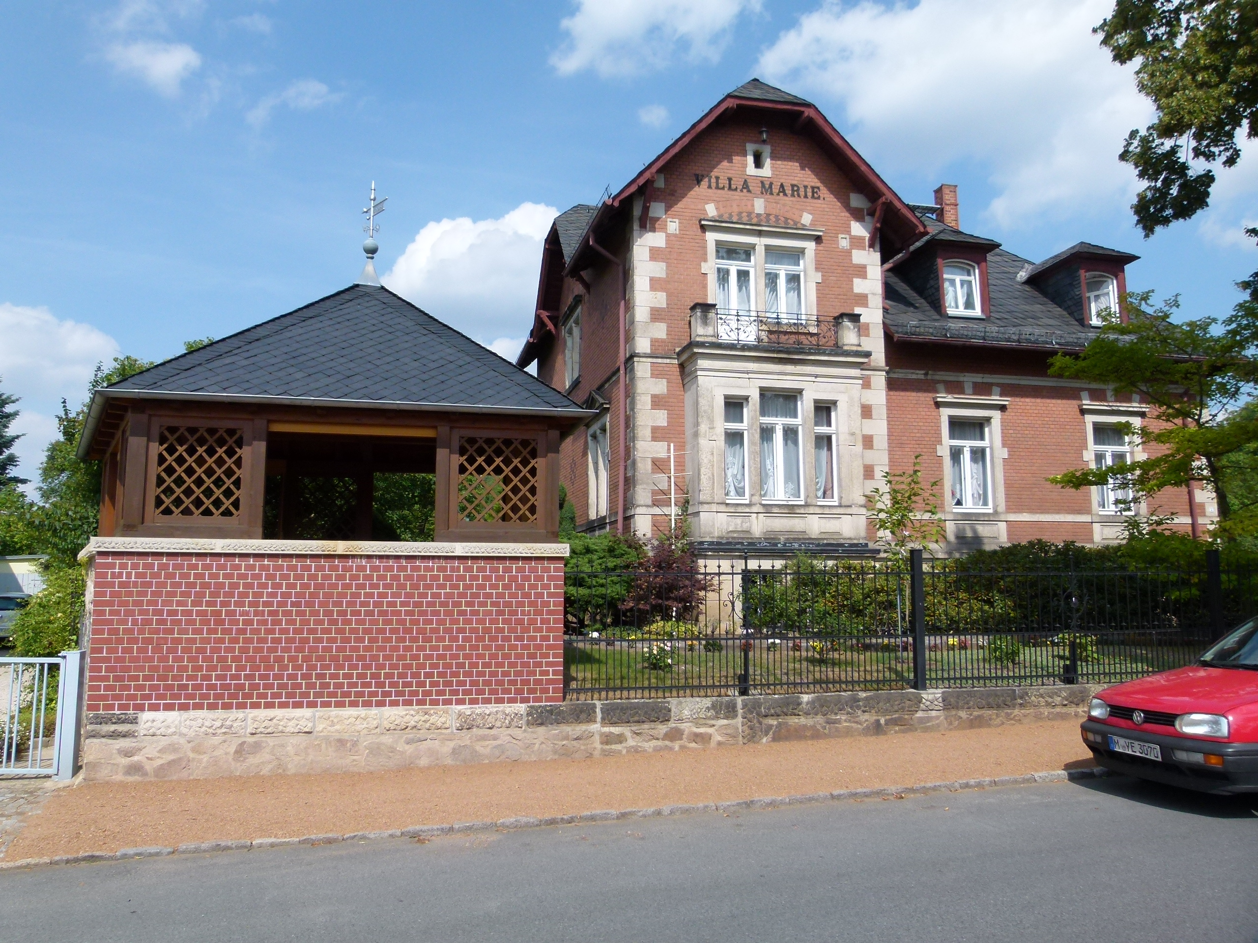 Denkmalgeschütztes Haus, Dr.-Rudolf-Friedrichs-Straße 17, Radebeul, Sachsen